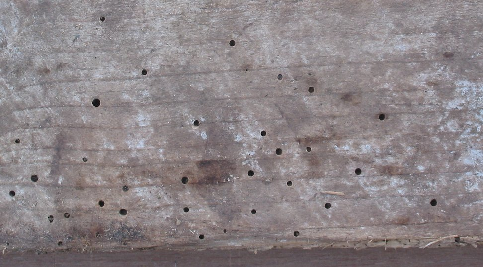 zelfgemaakte foto van houtwormaantasting van een balk